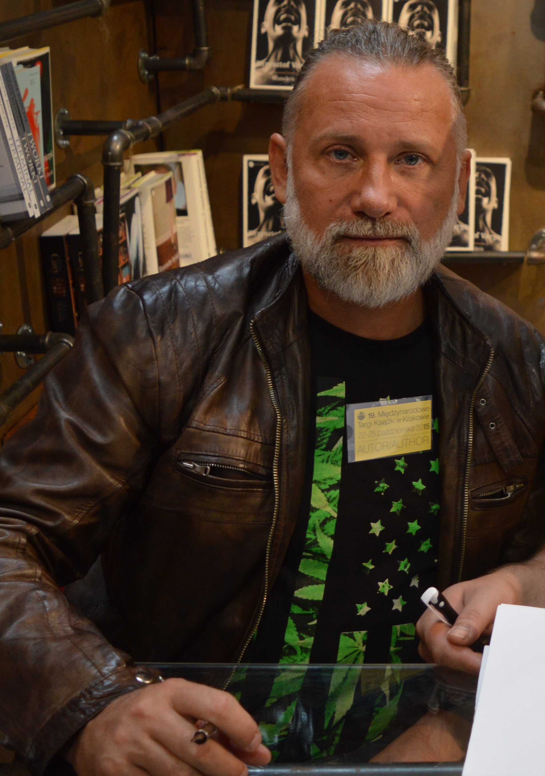 Andrzej Saramonowicz - scenarzysta, reżyser, producent, dziennikarz, dramaturg.